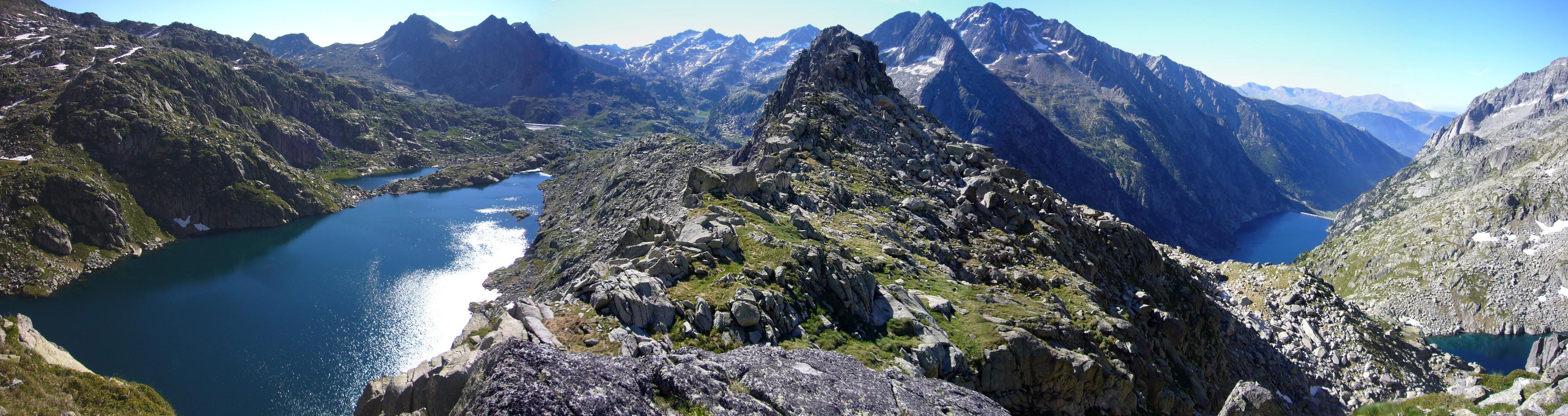 Capçalera de Caldes vista a mig camí entre l'Estany de Tumeneia de dalt i de la Bretxa de Pauss; la Vall de Boí, Alta Ribagorça, Catalunya